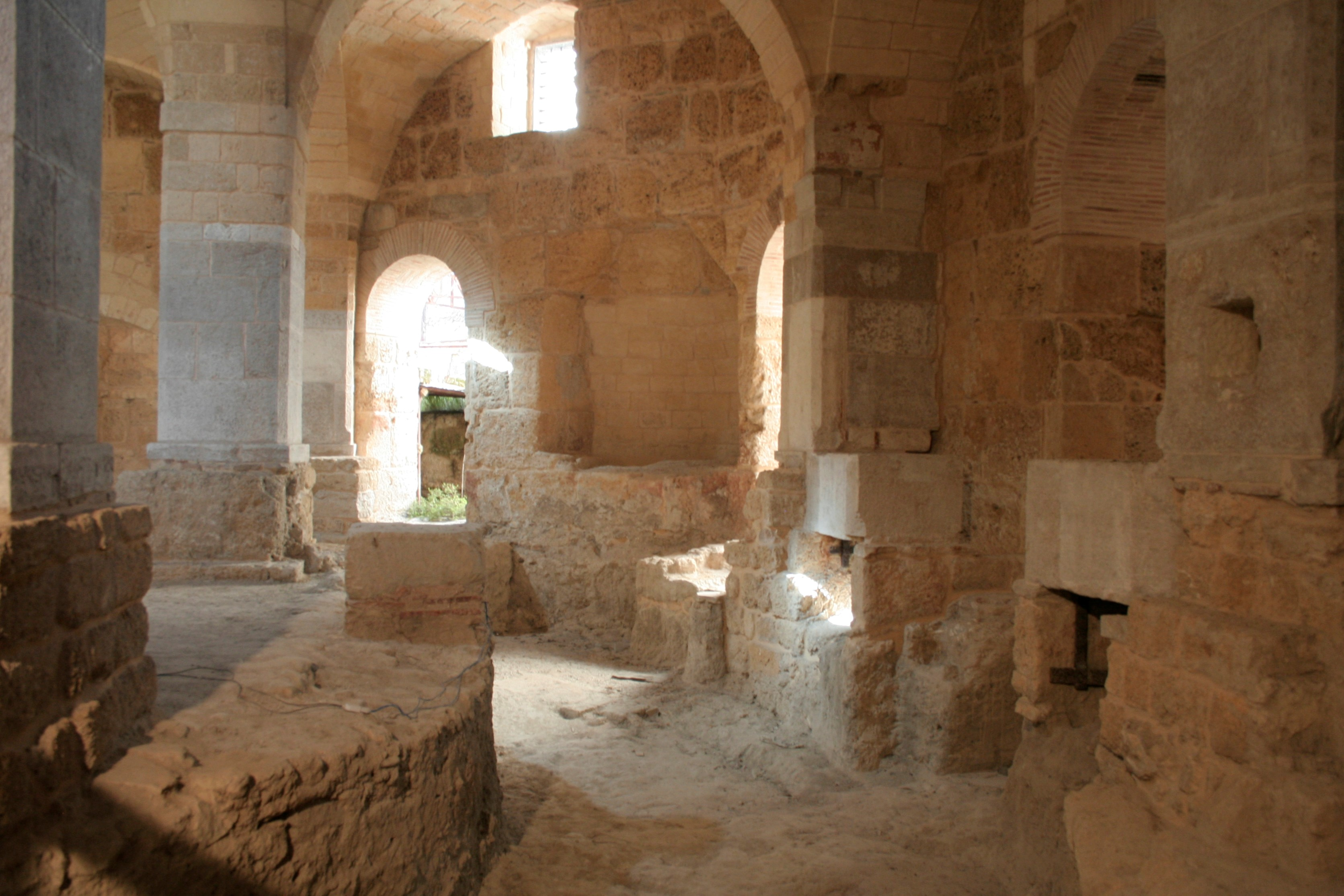 Saint John Baptistery in Canosa di Puglia